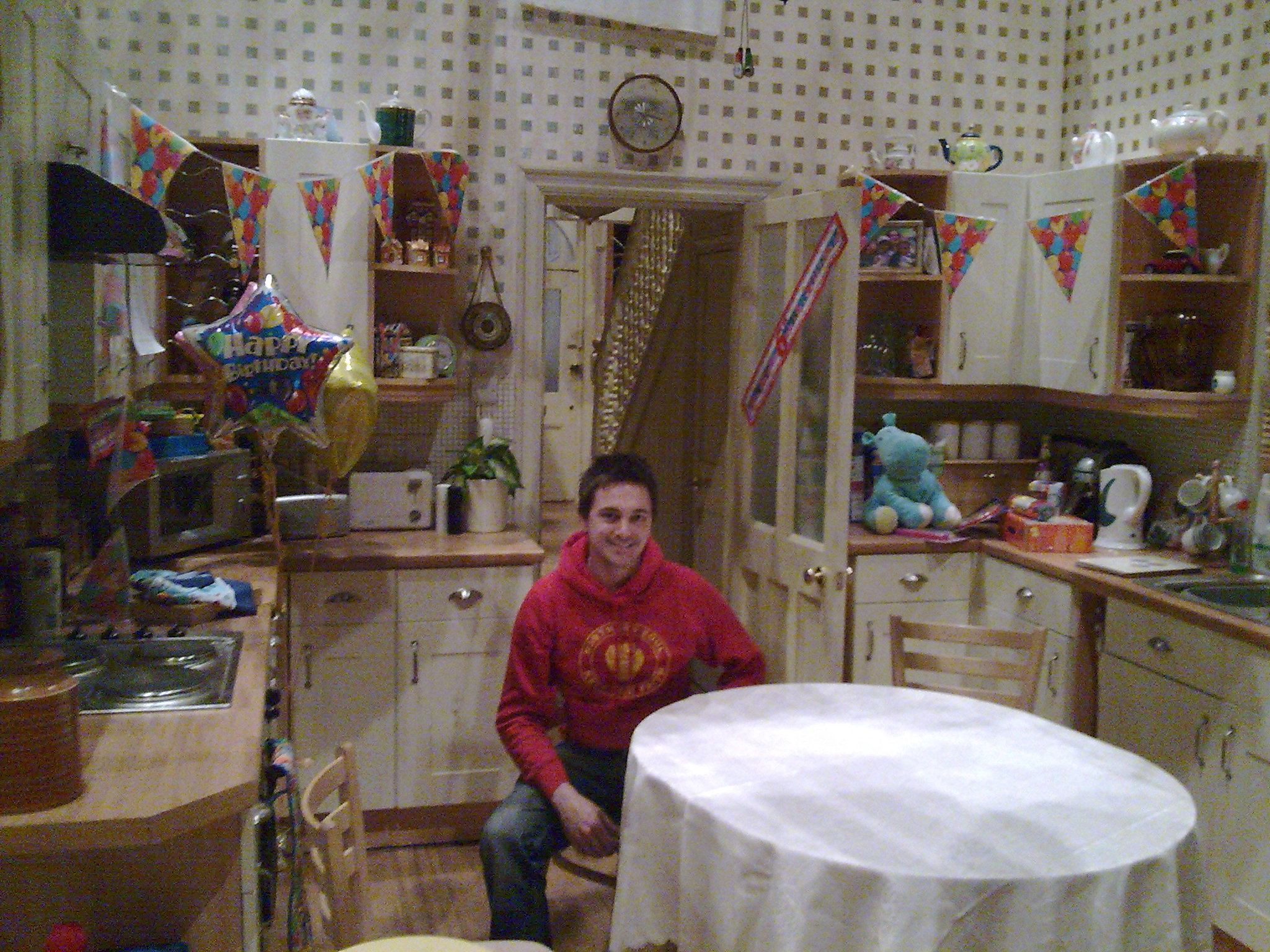 Eastenders Set